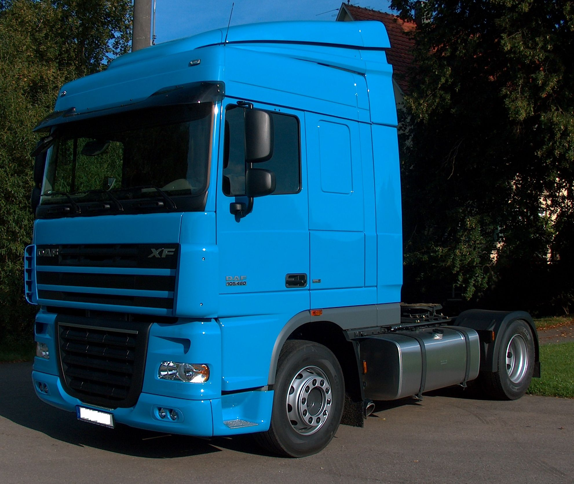 DAF XF 105.460 Seitenansicht